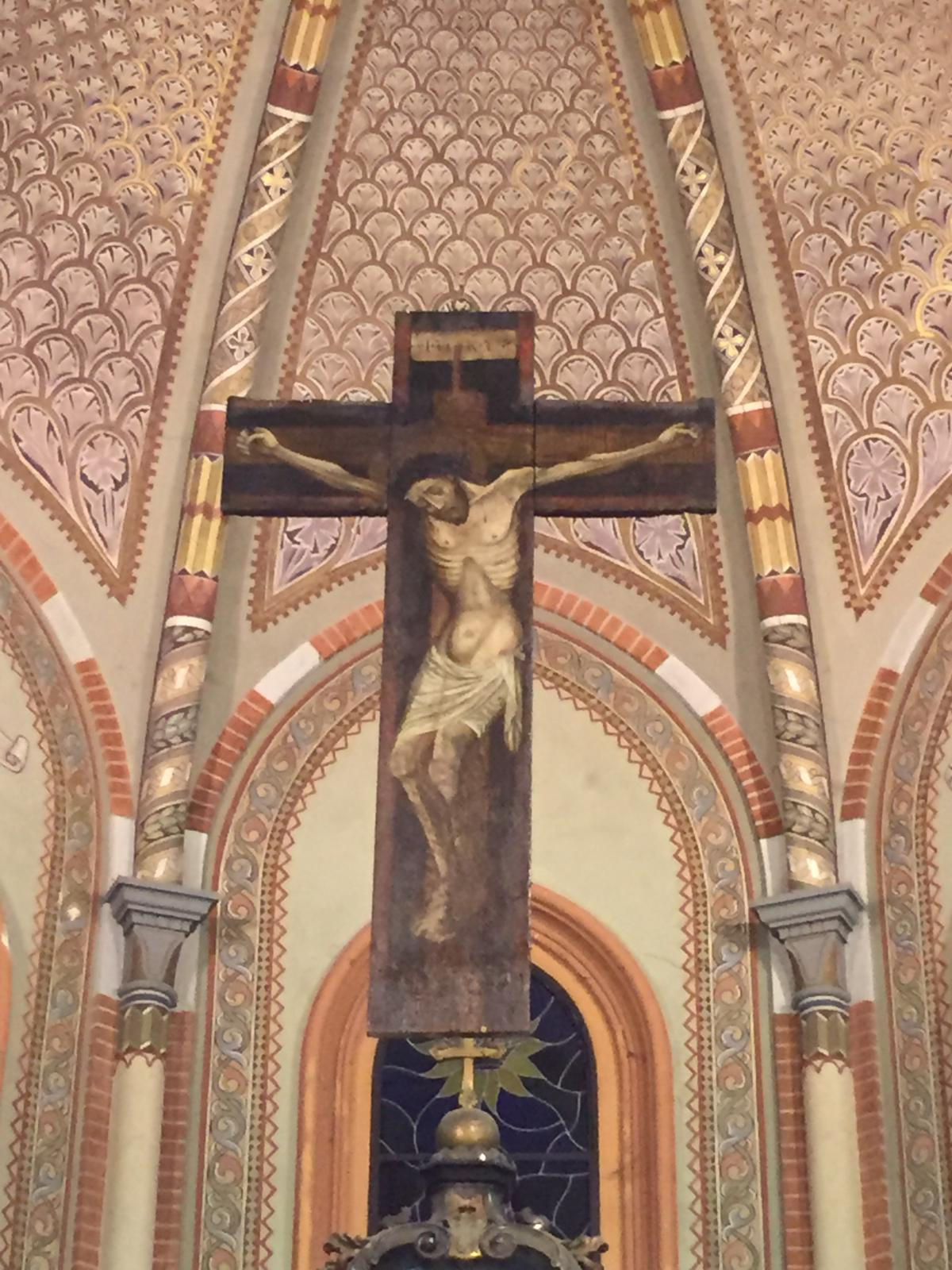 Crocefisso chiesa di basiano